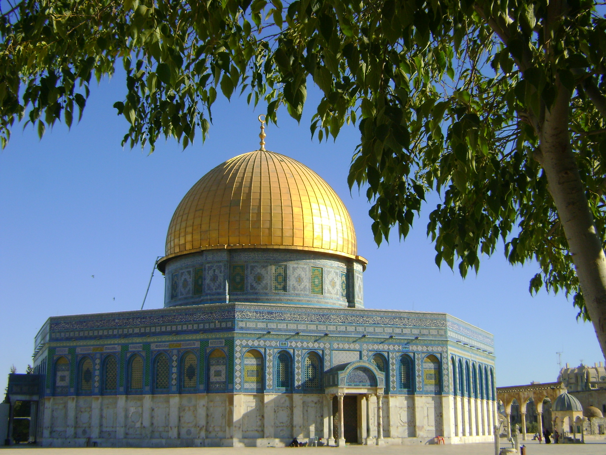 قبة الصخرة المشرفة - القدس الشريف ، فلسطين